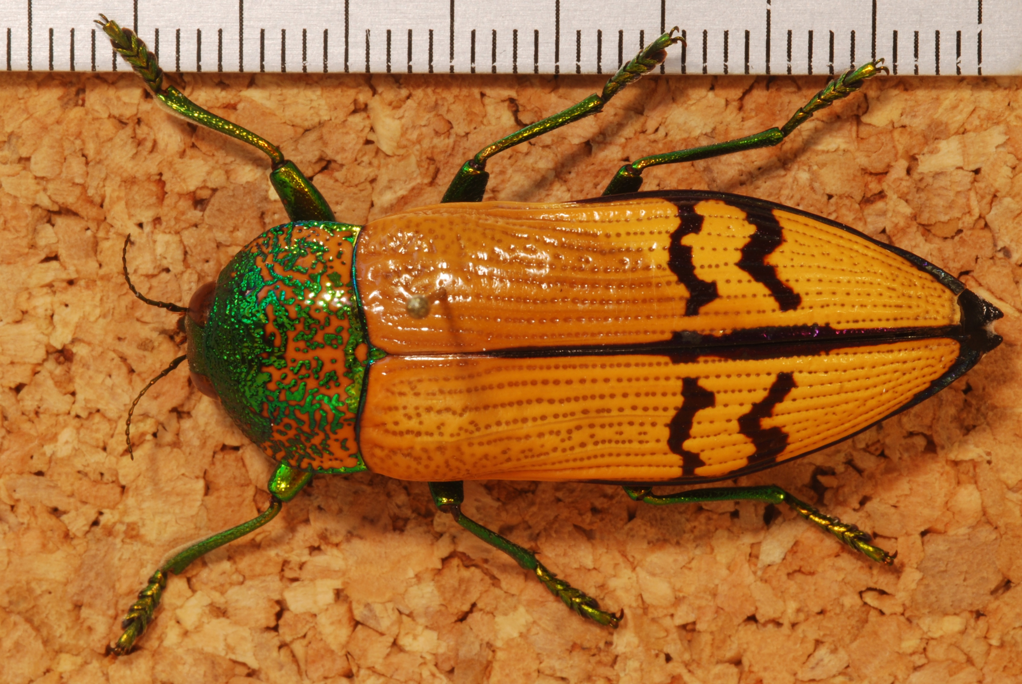 Wubin, Western Australia, AUSTRALIA